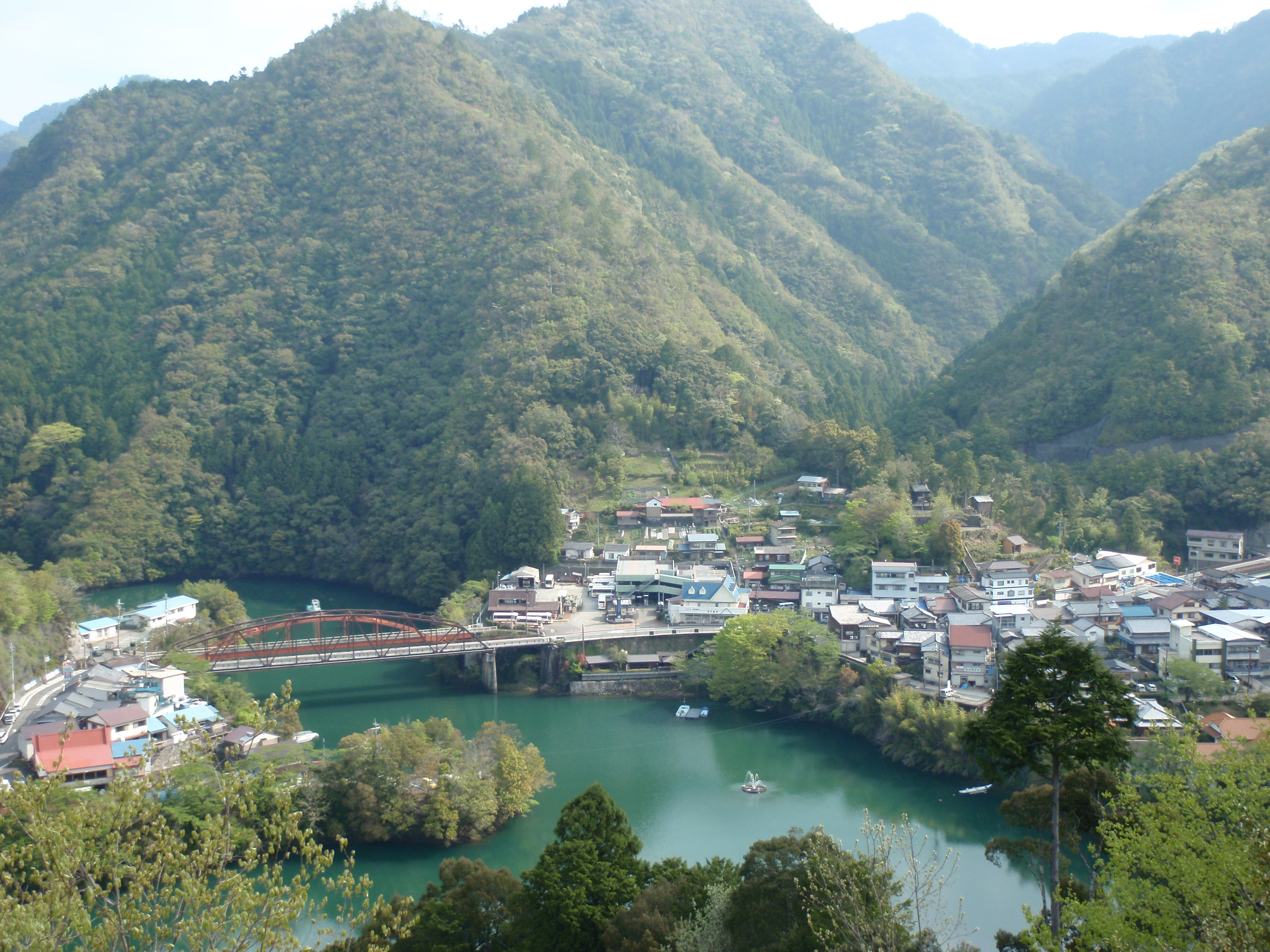 十津川温泉街中心部。二津野湖対岸より撮影。